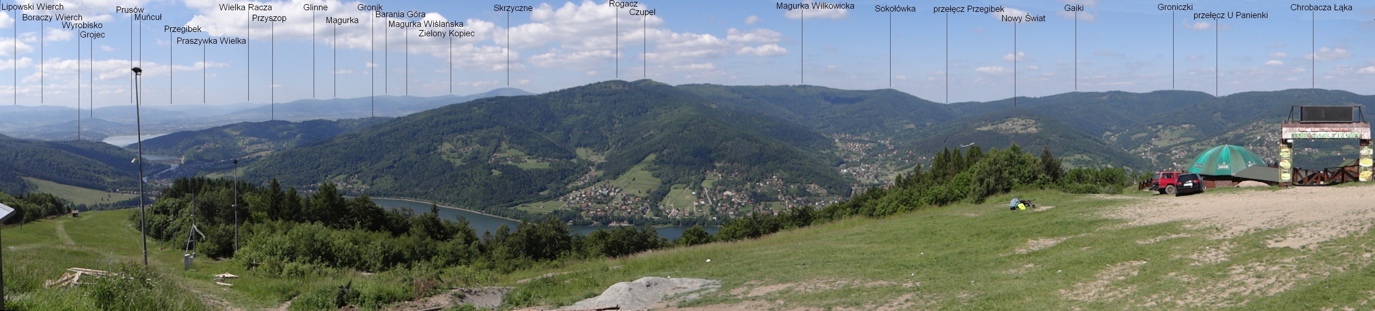 Panorama z Żaru